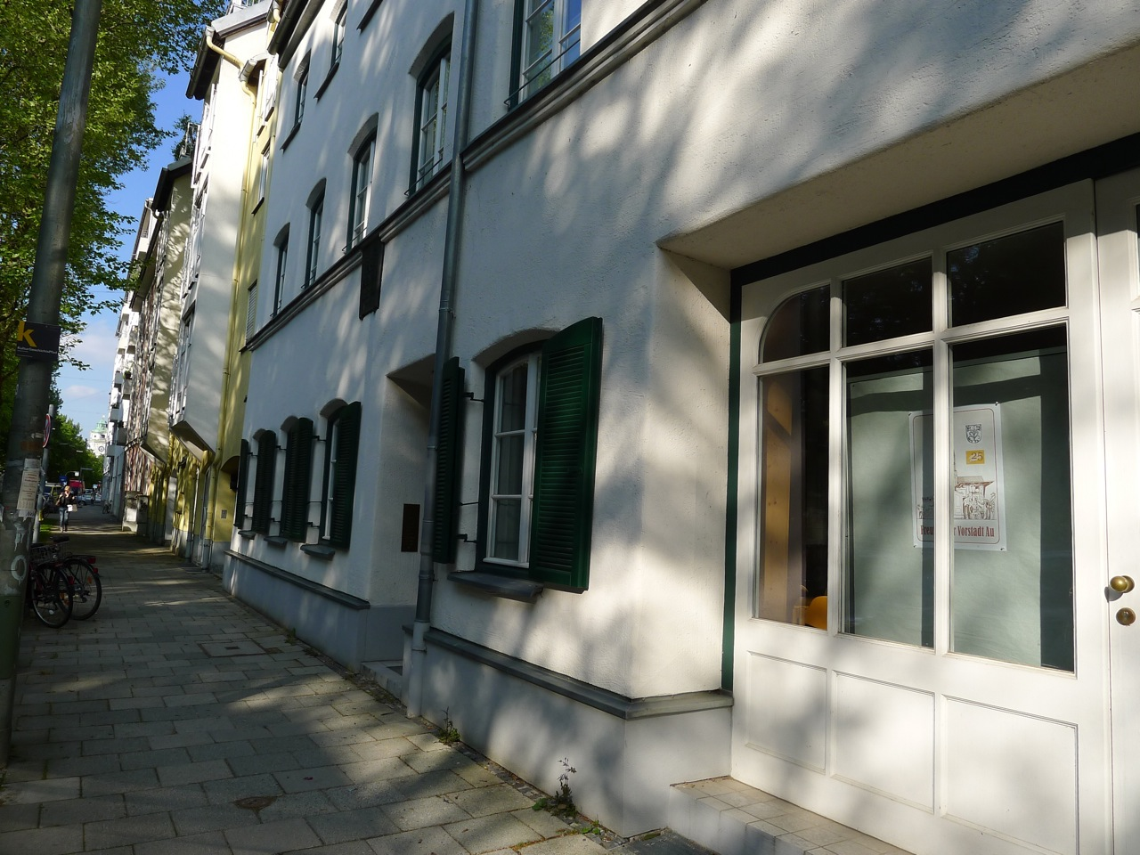 Geburtshaus Karl Valentins